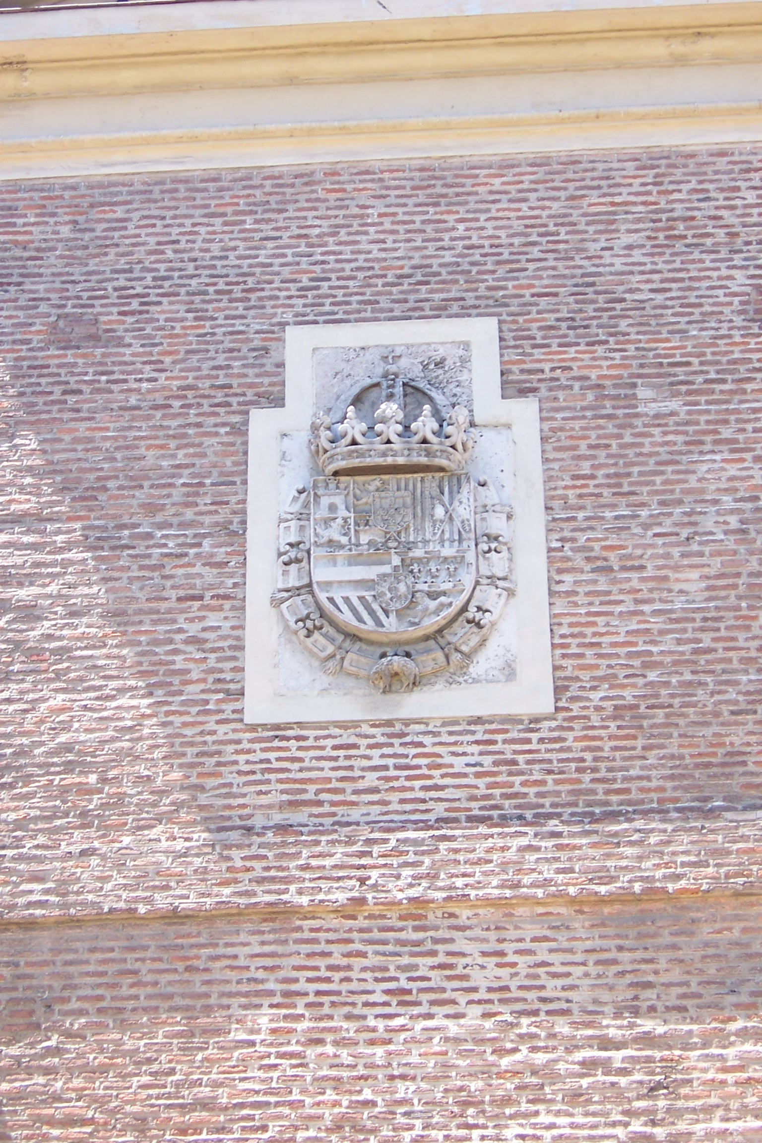 Convento de las Descalzas Reales de Valladolid. Escudo real (Felipe III y Margarita de Austria) sobre la fachada.